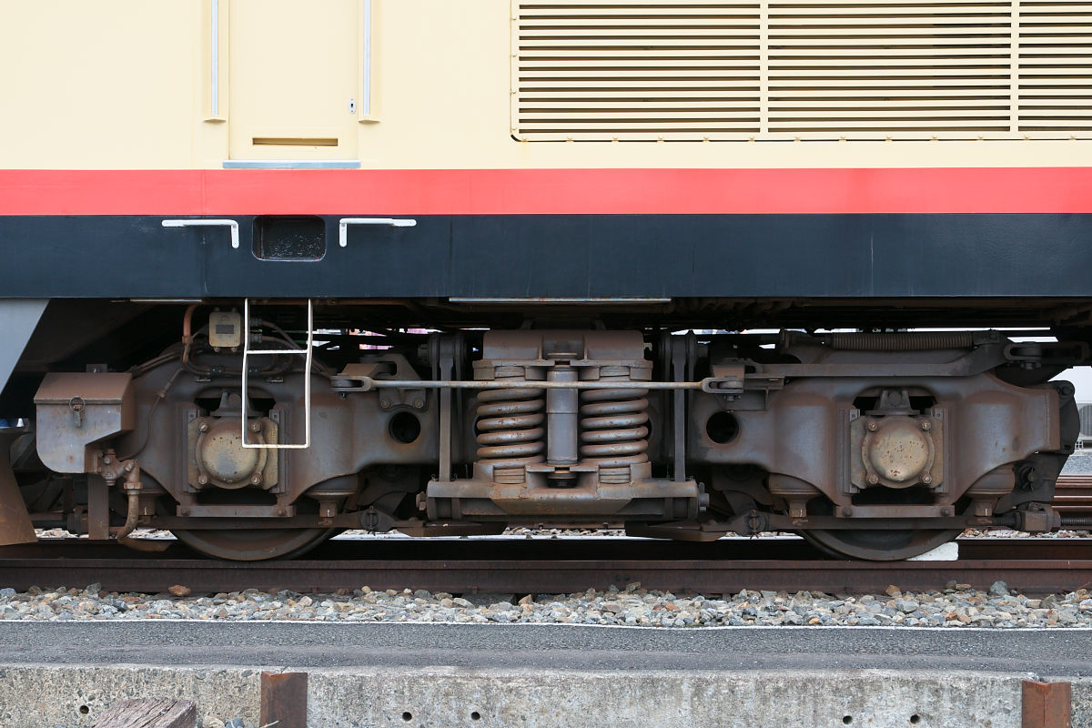 西武鉄道E31形電気機関車（E31）のDT20A形台車。横瀬車両基地の保存車。